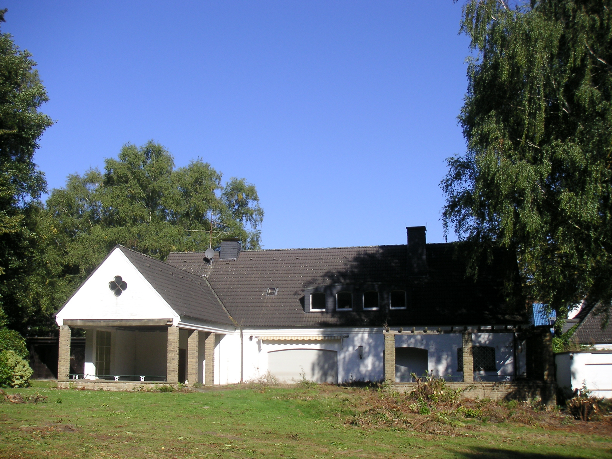 Landhaus für Peter Rehme in Dortmund-Kirchhörde. Architekt: Breuhaus de Groot